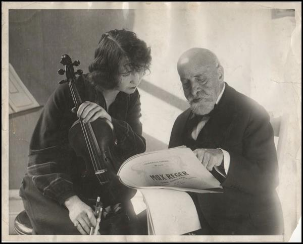 Ауэр с ученицей